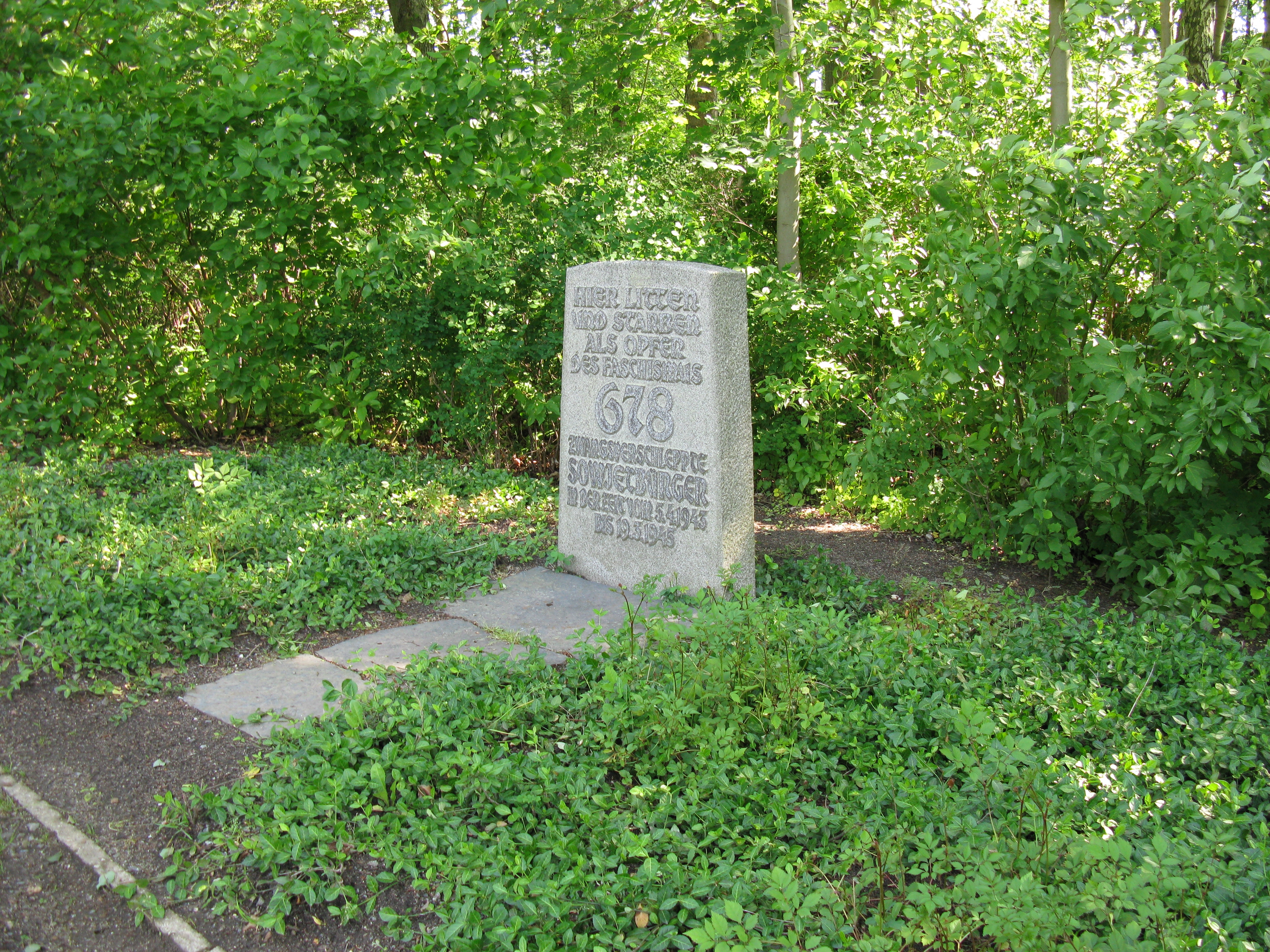 Denkmalgeschützter Gedenkstein für die Opfer von Zwangsarbeit im Rückkehrersammellager Kauschwitz-Holzmühle (heute Stadtteil von Plauen